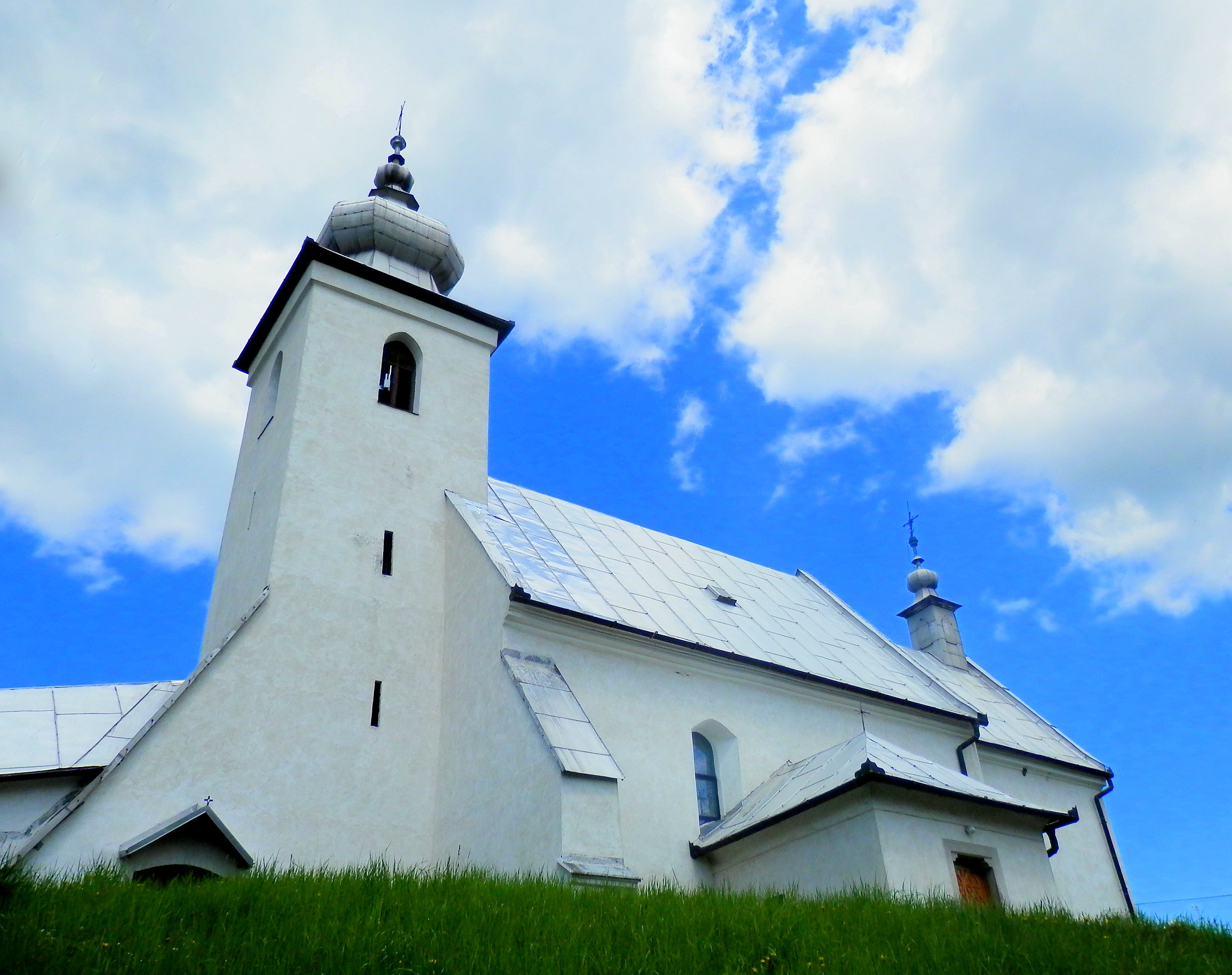 Kostol v obci Brutovce, okres Levoča.